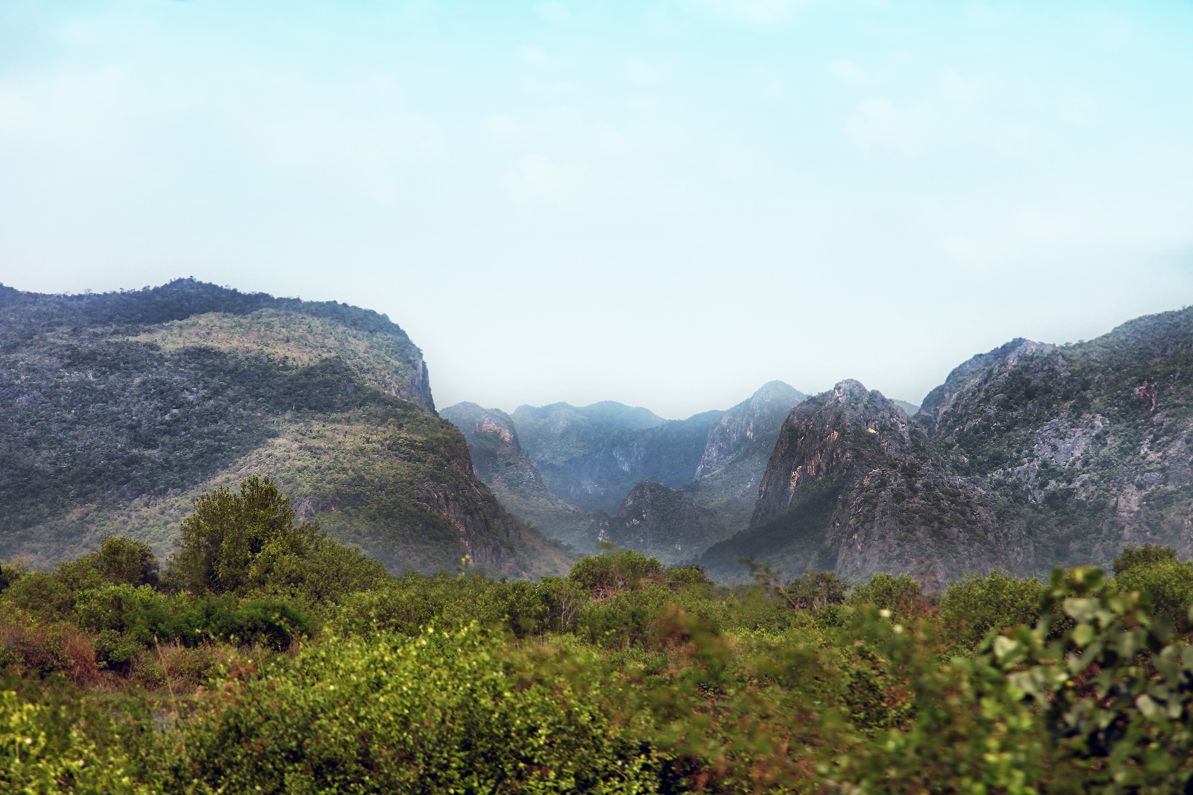 อุทยานแห่งชาติเขาสามร้อยยอด